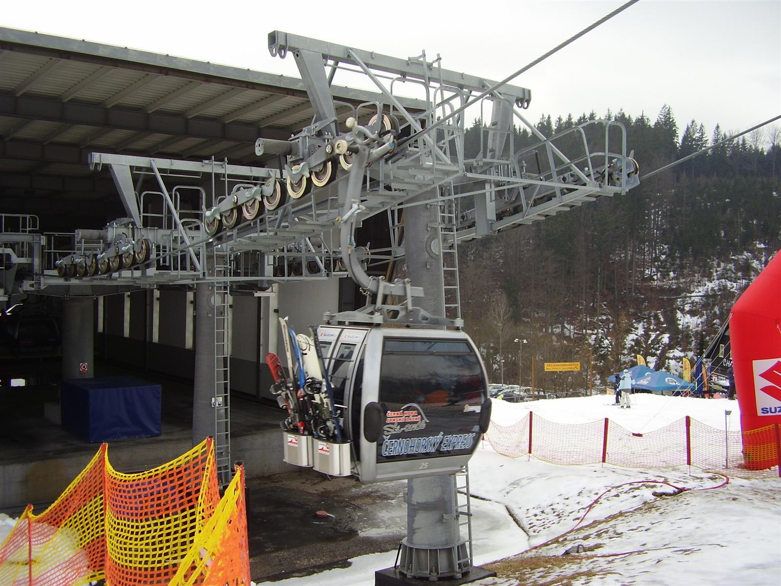 8místná kabinová lanová dráha Jánské lázně – Černá hora